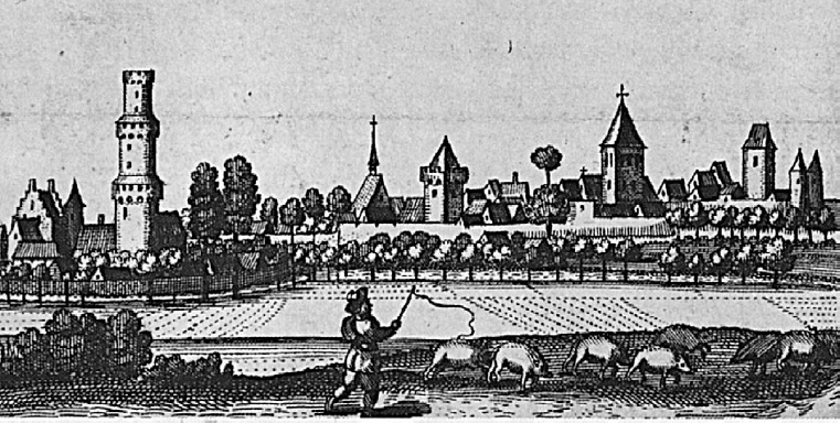 Kupfertsich mit einer Ansicht von Burg und Stadt Dinslaken aus Richtung Westen